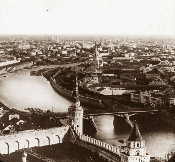 Вид с Ивана Великого к юго-востоку, на Садовники и Котельники, 1850-е - 60-е годы.